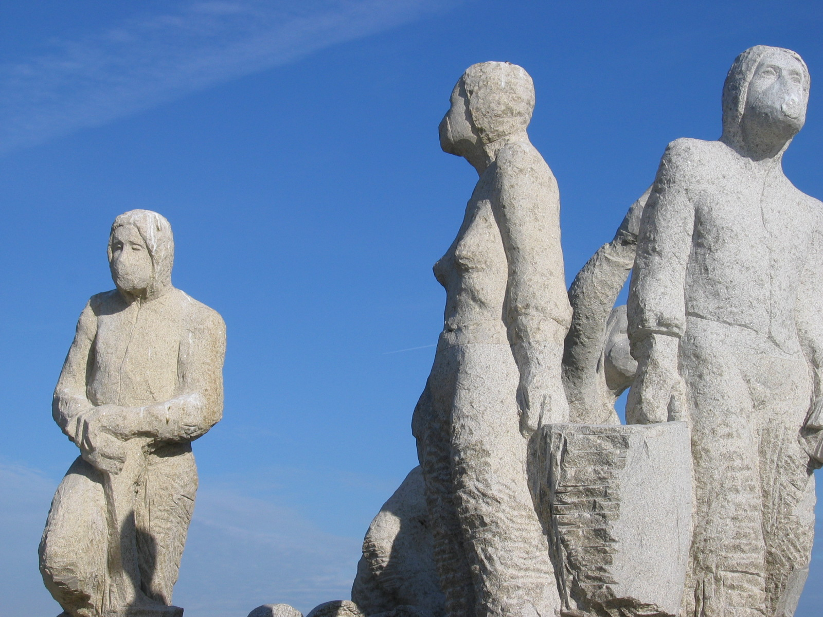 Monumento ós voluntarios (O Grove) (Autor: Óscar Aldonza Torres e outros)